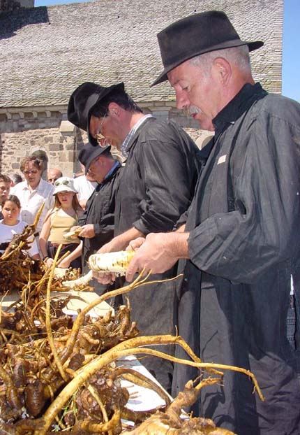 Description préparation des racines de gentiane Date2003SourceSelf-photographedAuthorcharlespierrePermission (Reusing this file) charlespierre préparation des racines de gentiane